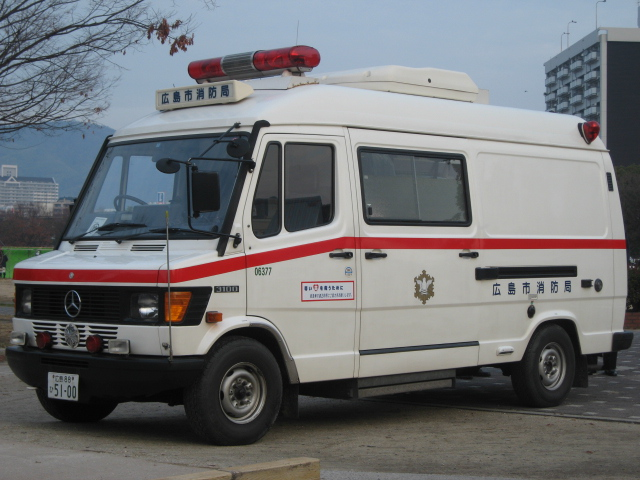 広島市消防局 予備高規格救急車